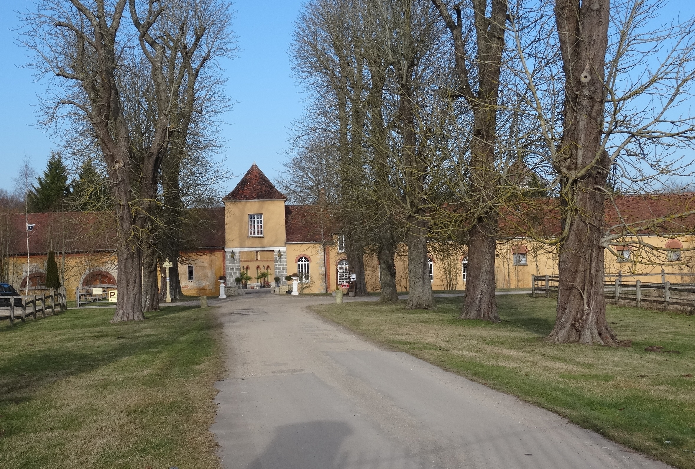 La ferme de Pontcarré. (Seine-et-Marne, région Île-de-France).